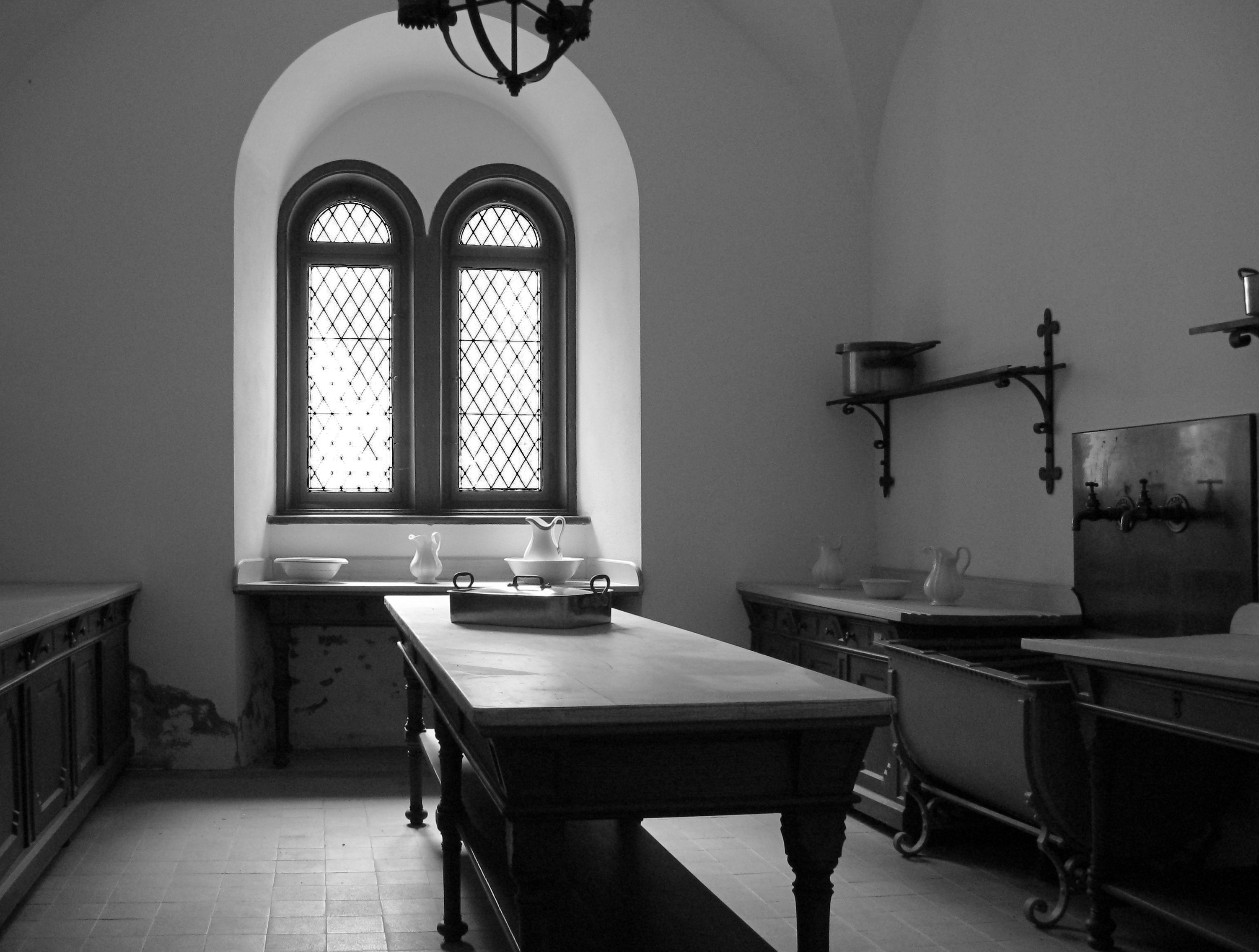 Küche in Neuschwanstein